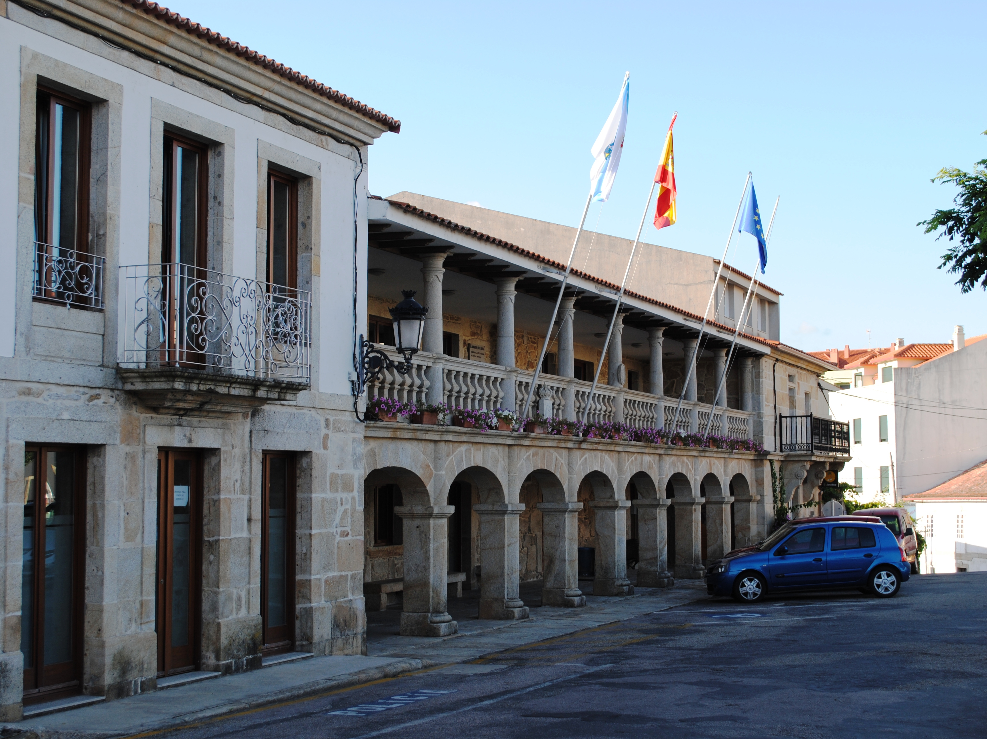 O Rosal, Casa do Concello